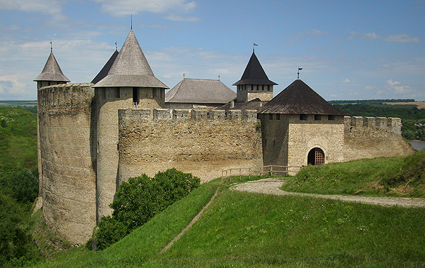 Хотинская крепость